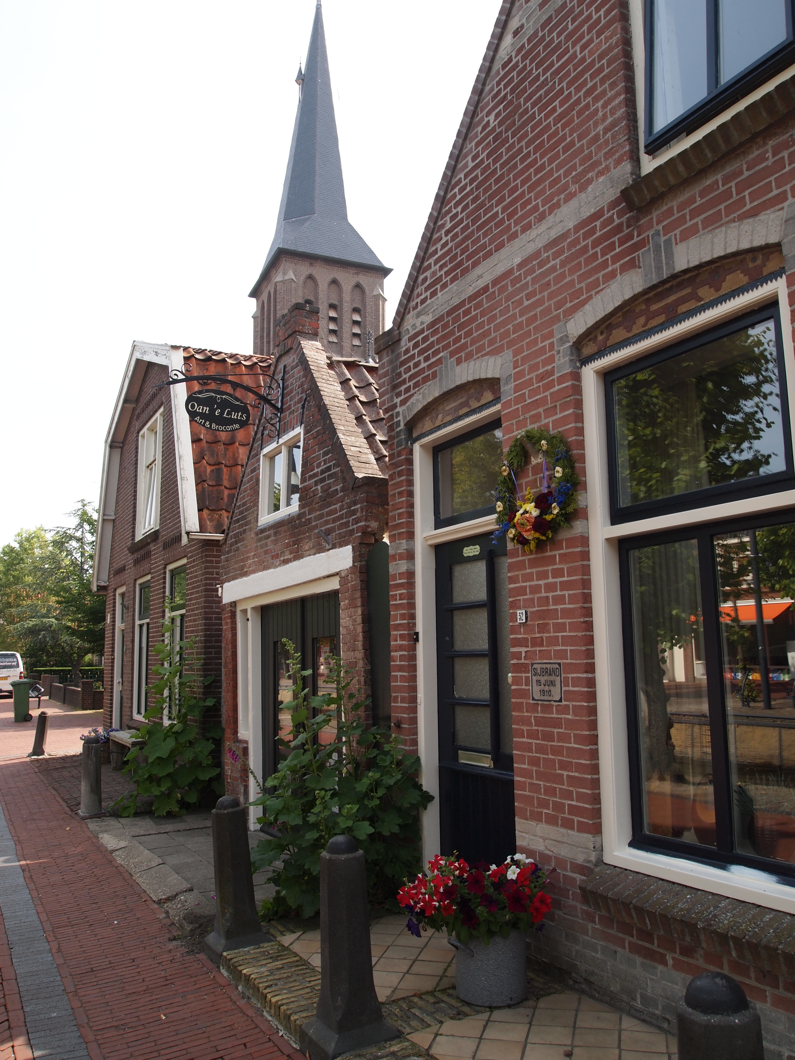 Brocante aan de Luts